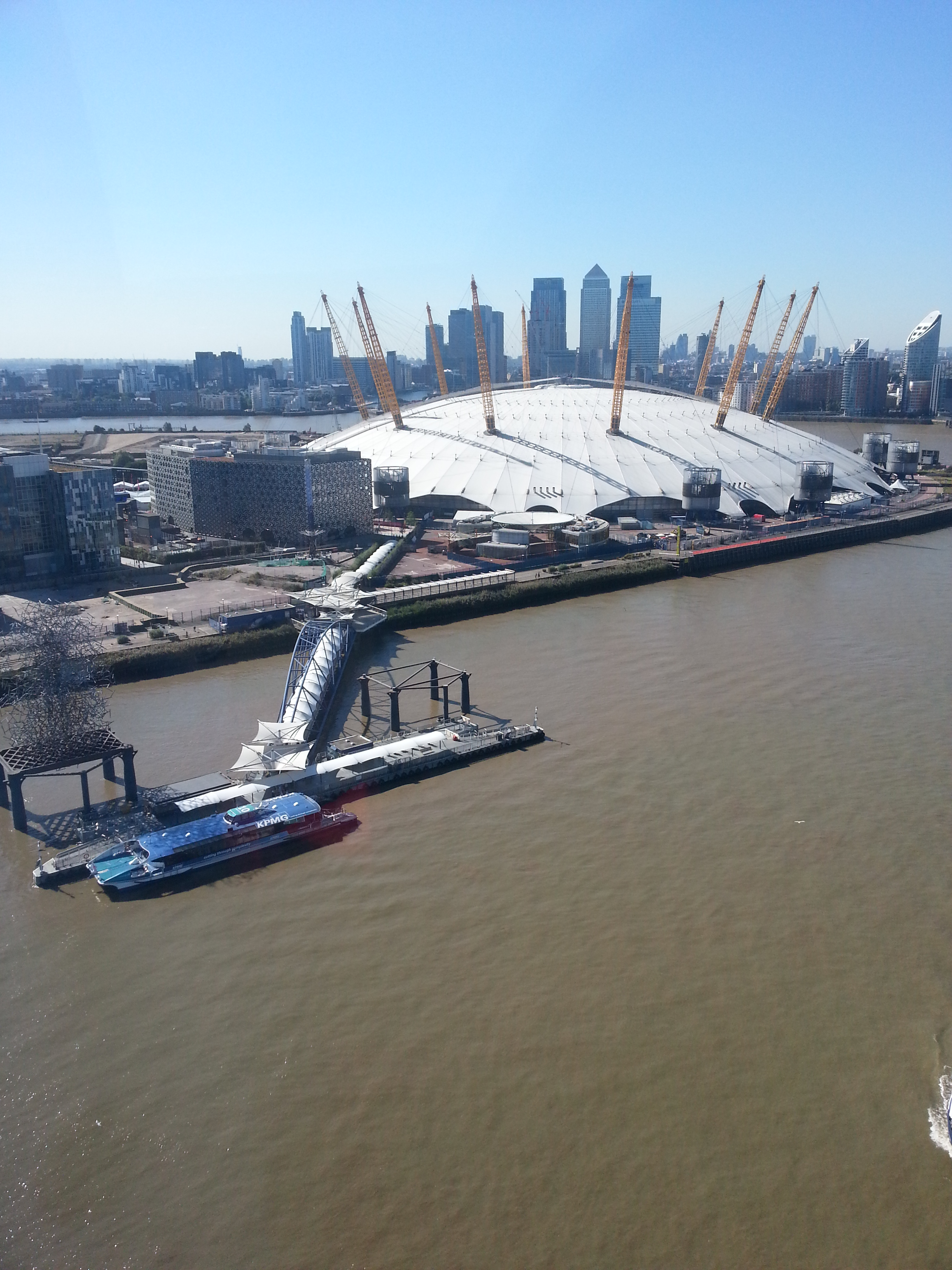 O2 arena,Grennwich, London